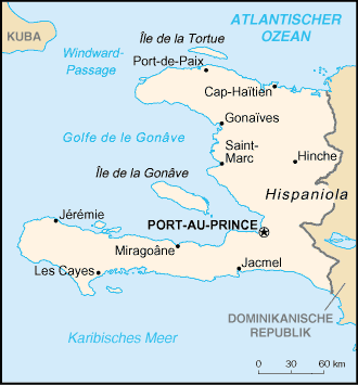 Beschreibung: Karte von Haiti Übersetzung: Benutzer:Pit